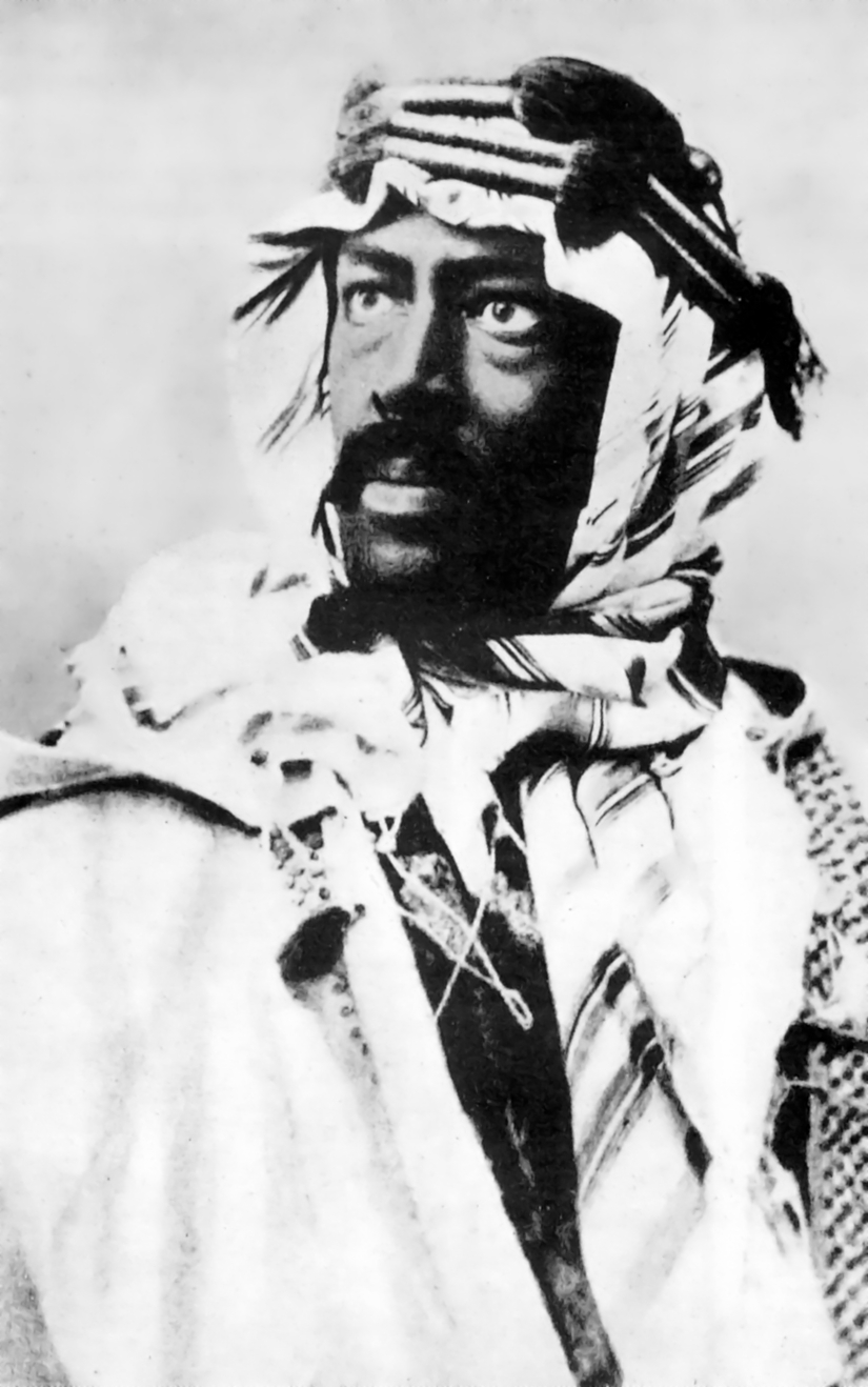 The Russian actor and director Constantin Stanislavski (Константин Сергеевич Станиславский) as William Shakespeare's Othello (1896)